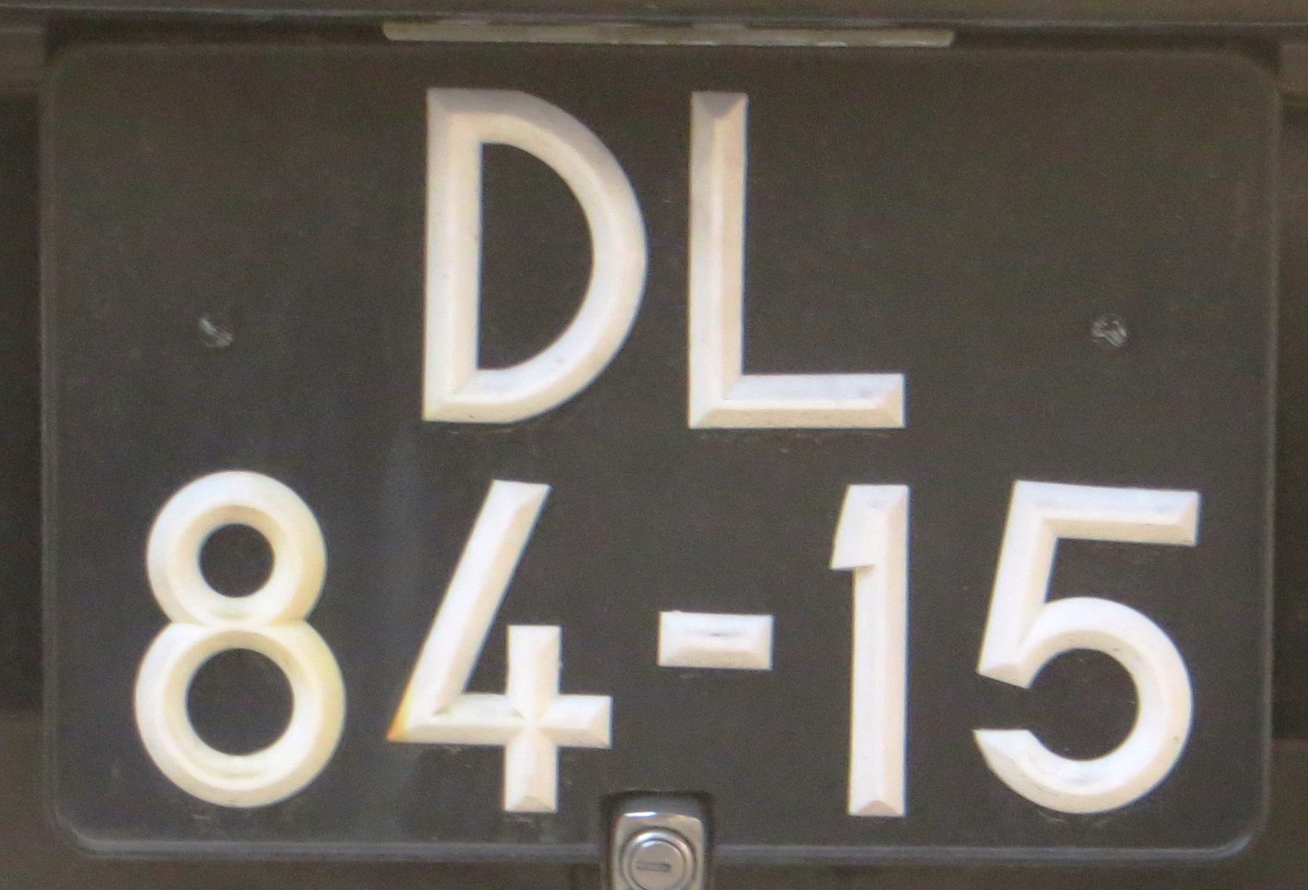 kentekenplaat Portugal oud